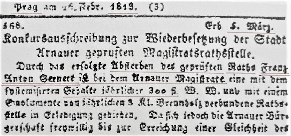 Kaiserlich-königliche privilegierte Prager Zeitung- Prag 26.02.1819, Ausschnitt Ratsstellenausschreibung, Beispiel einer Ausschreibung mit Besoldung und personellen Privilegien um 1819